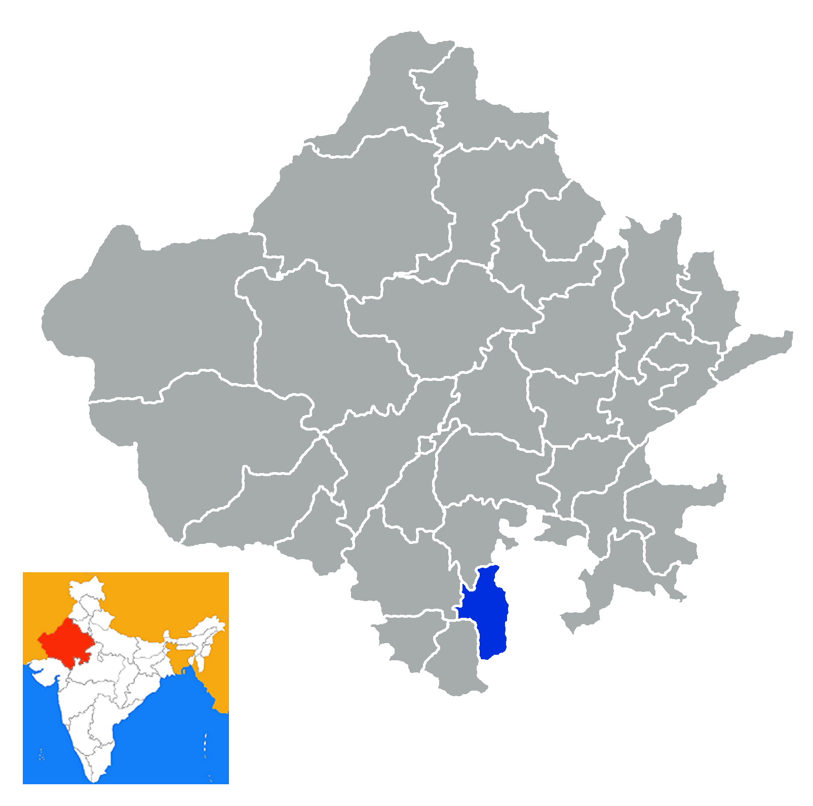 Distrito de Pratpgarh Rajastan India